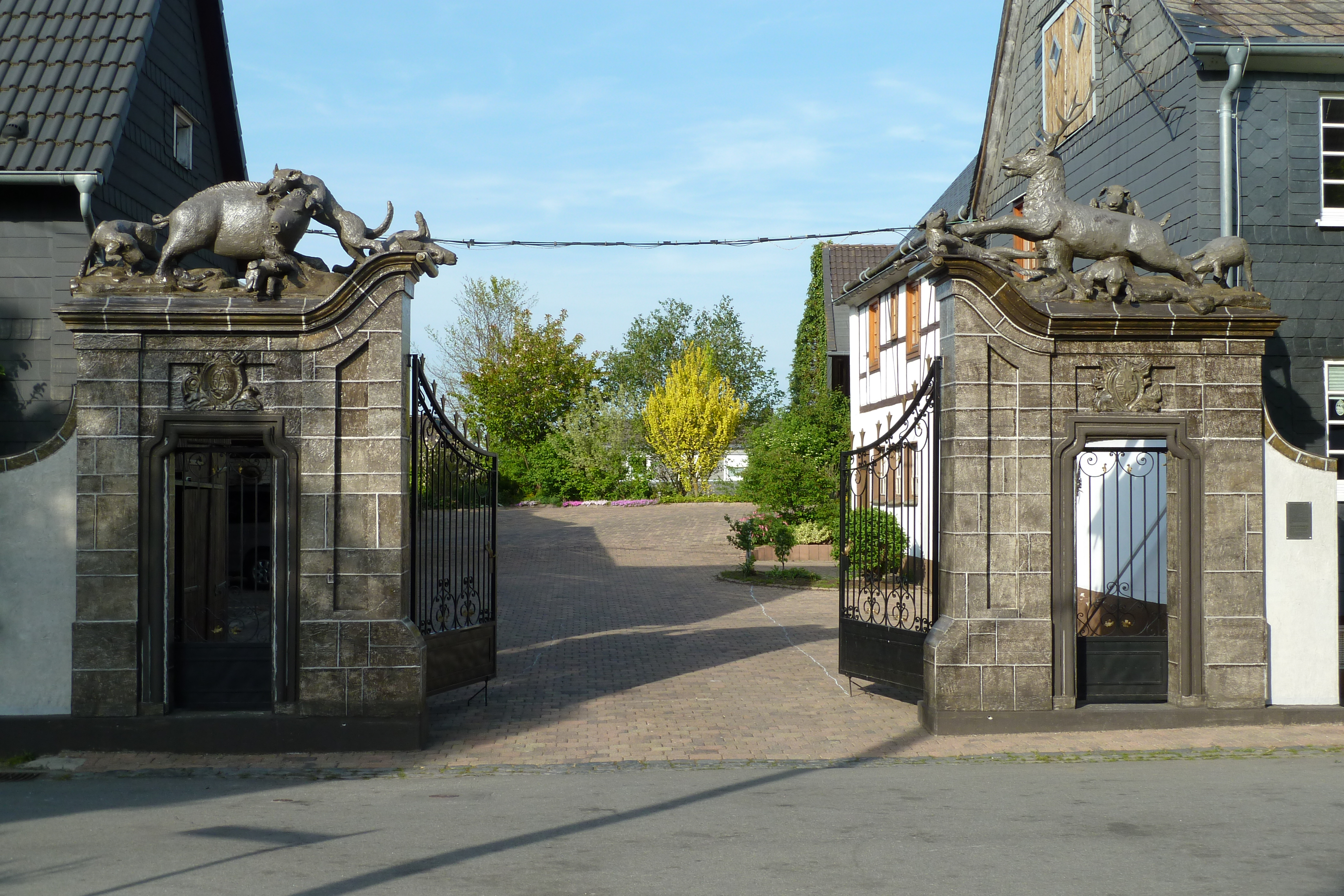 Verkleinerter Nachbau des Hirschberger Tors in Warstein-Hirschberg.